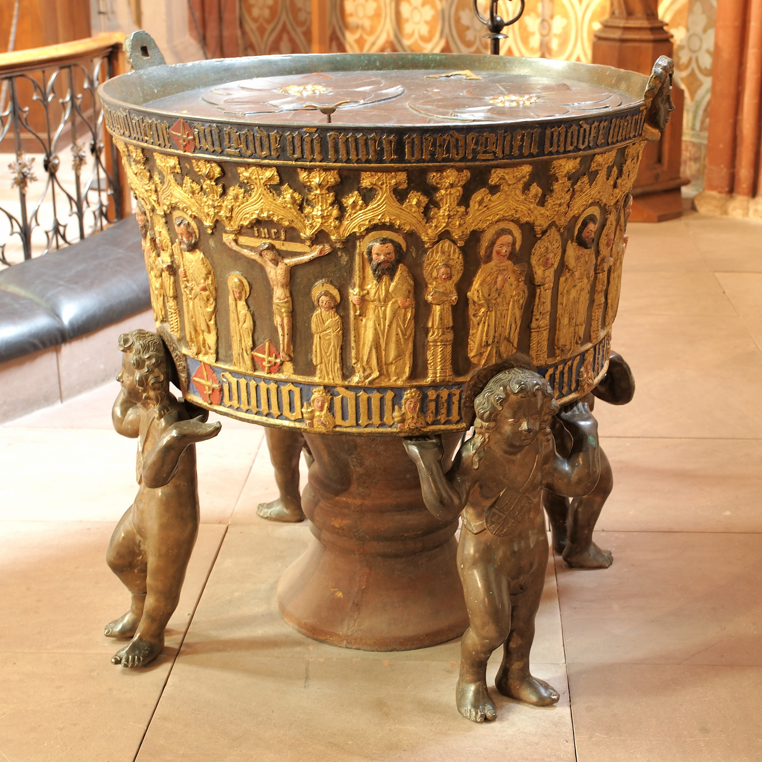 Bronzefünte von 1480 im St. Petri Dom zu Schleswig, Ansicht von Westen